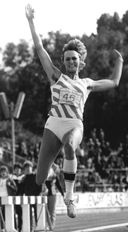 Heike Drechsler ADN-ZB Kasper 13.6.85 Jena: Heike Drechsler erneut mit weiten Sprüngen. Weitsprung-Weltmeisterin Heike Drechsler (SC Motor Jena) erzielte beim DVfL-Sportfest am 12.6.85 in Jena bei widrigen Bedingungen mit der Siegerweite von 7,33 m (allerdings zu starker Rückenwind) erneut ein ausgezeichnetes Ergebnis.